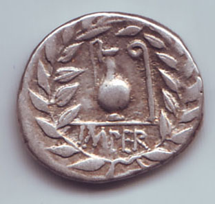 Изображение литууса и каписа можно увидеть на денарии Кв. Цецилия Метелла Пия, отчеканненом в 81 году до н. э. С сайта